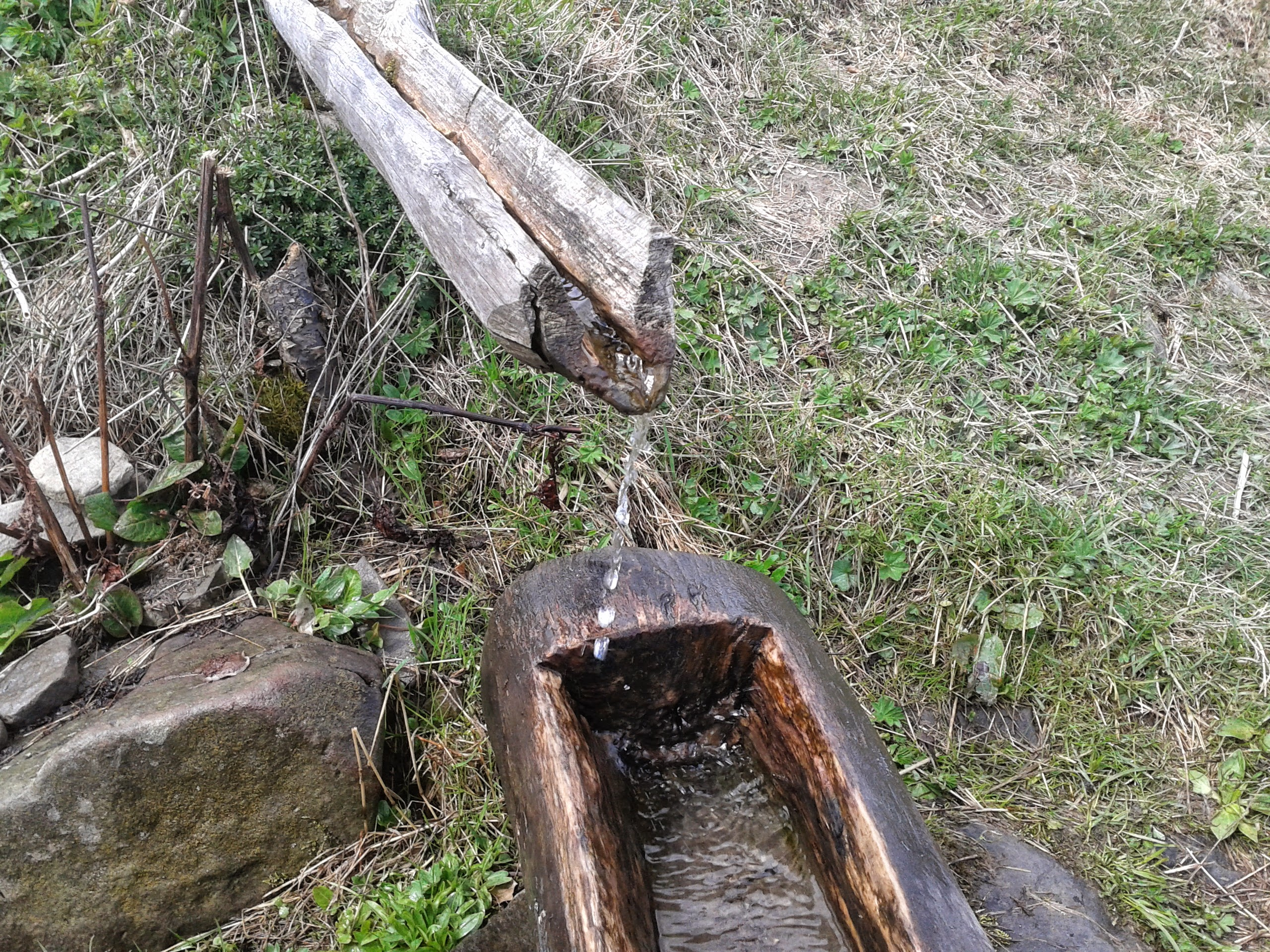 Źródło, które bierze swój początek na górze Jasień